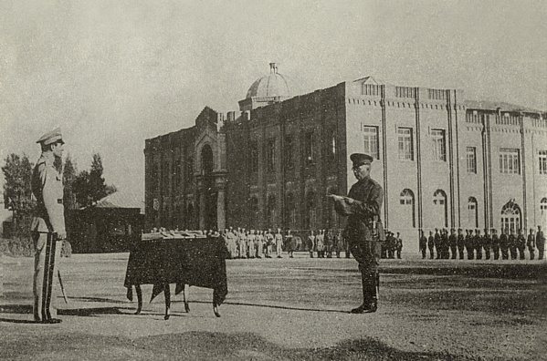 آیین دانش‌آموختگی افسران ارتش با حضور محمد رضا پهلوی - 1940 - ۱۳۱۹ خورشیدی